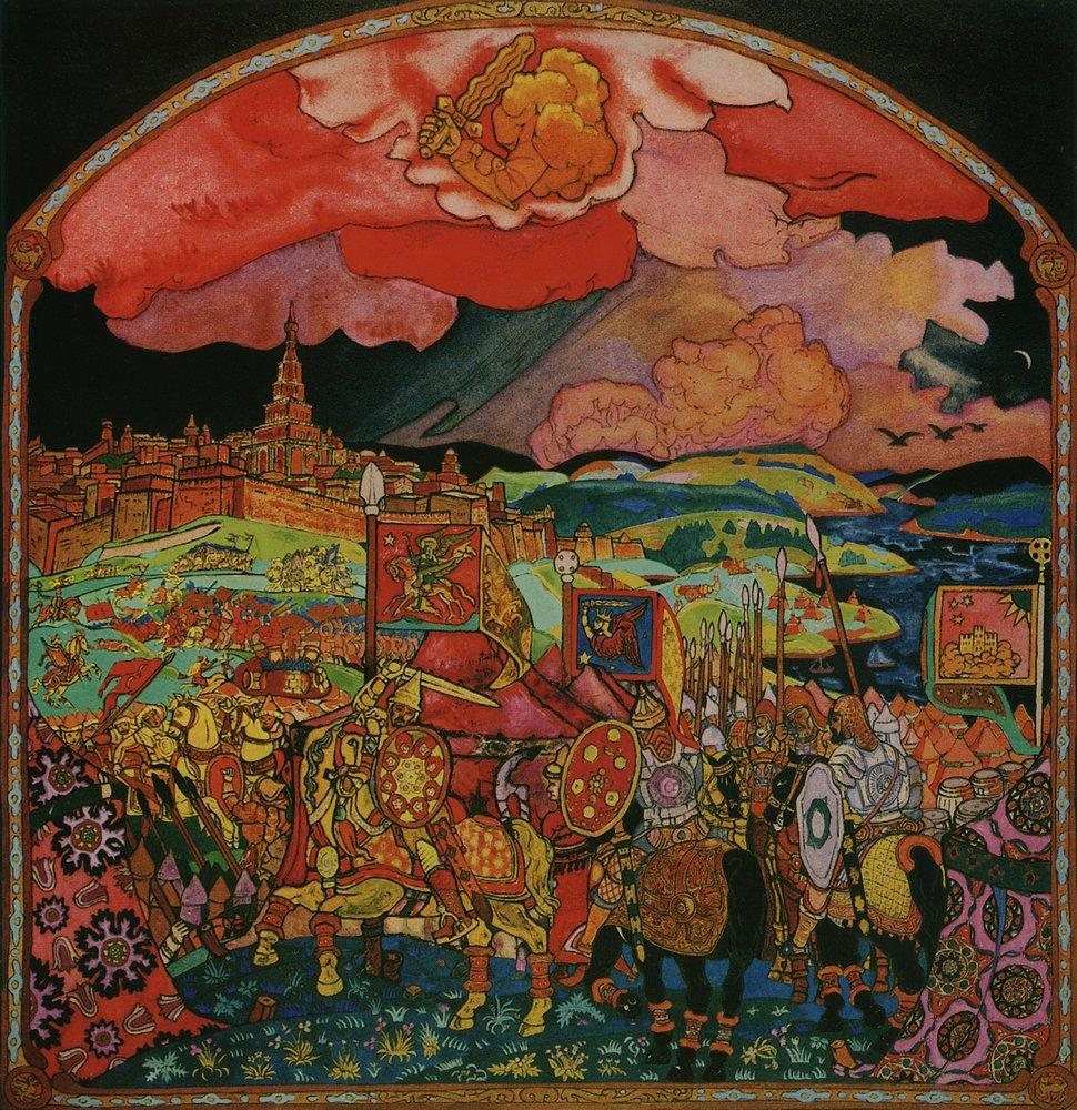 «Взятие Казани» (другое название — «Покорение Казани»). Эскиз панно для вестибюля Казанского вокзала в Москве. Эскизы написаны в 1913—1914 годах в нескольких вариантах. Само панно было уничтожено в 1933 году. Бумага, темпера. 83×78. Национальная галерея Армении, Ереван. Инв. № Ж-592/897.